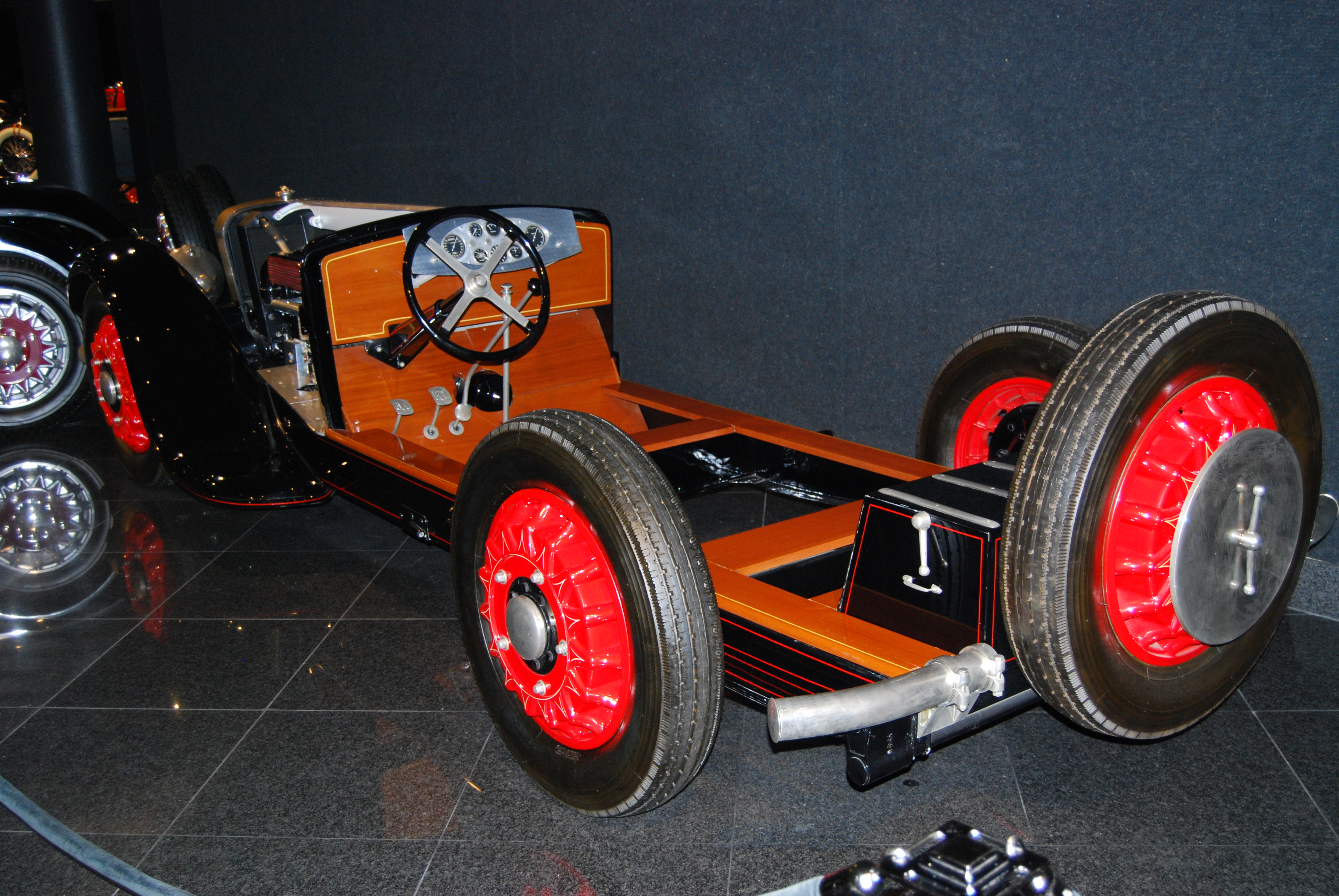 F_DSC_0708